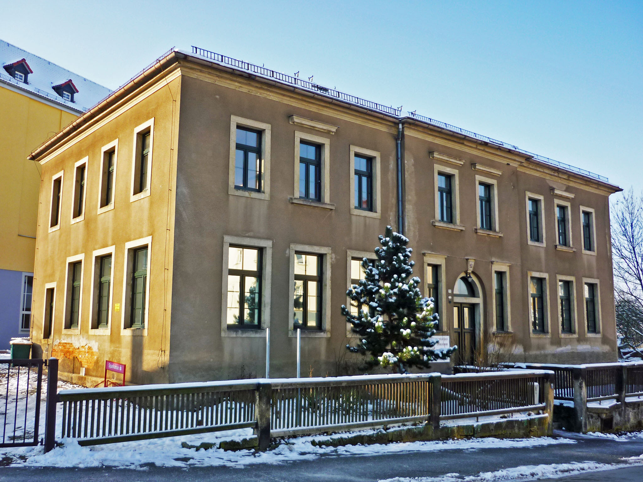 Freital-Birkigt, Gitterseer Str. 28 (Alte Schule)